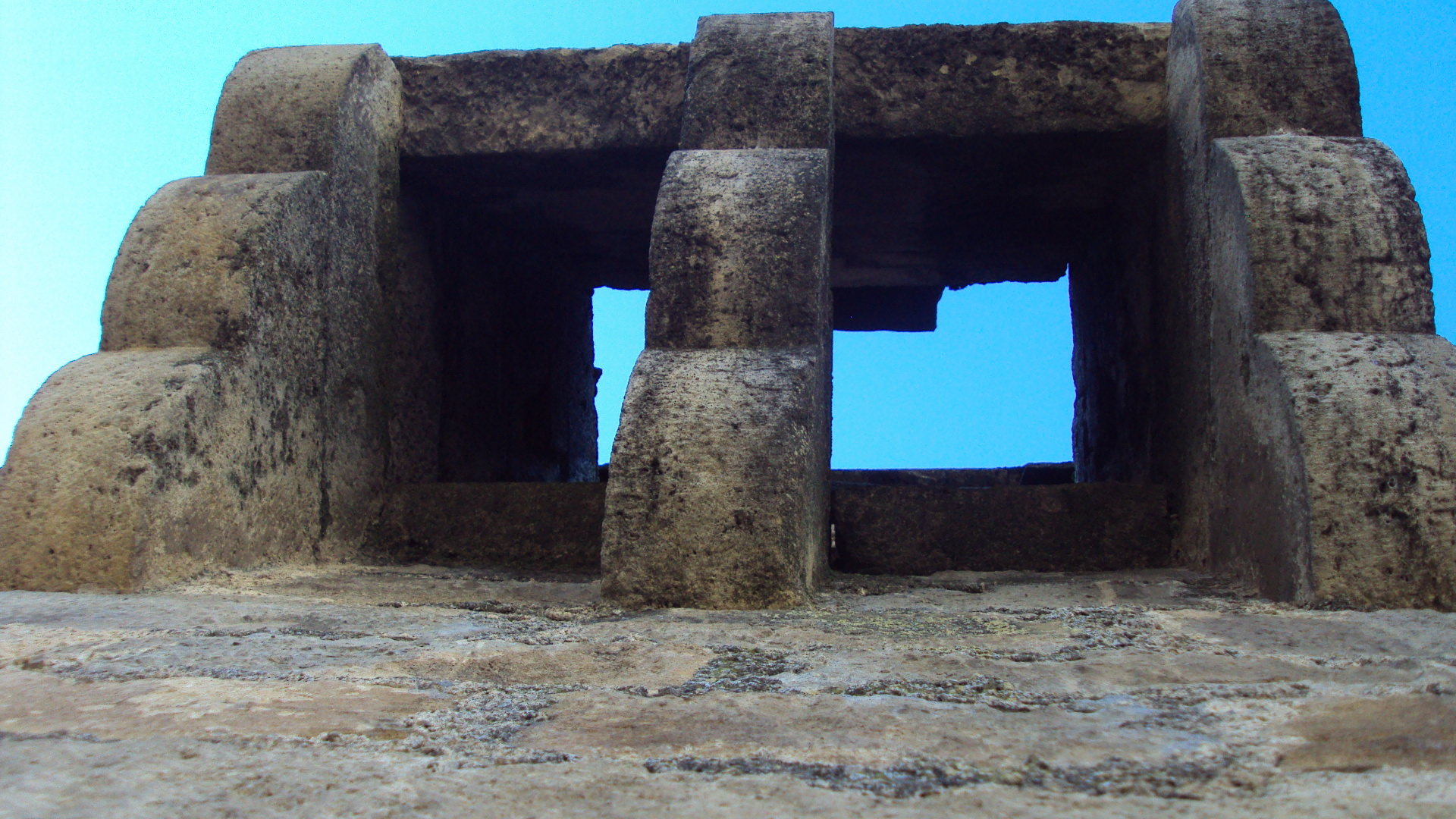 Matacán de piedra visto desde abajo